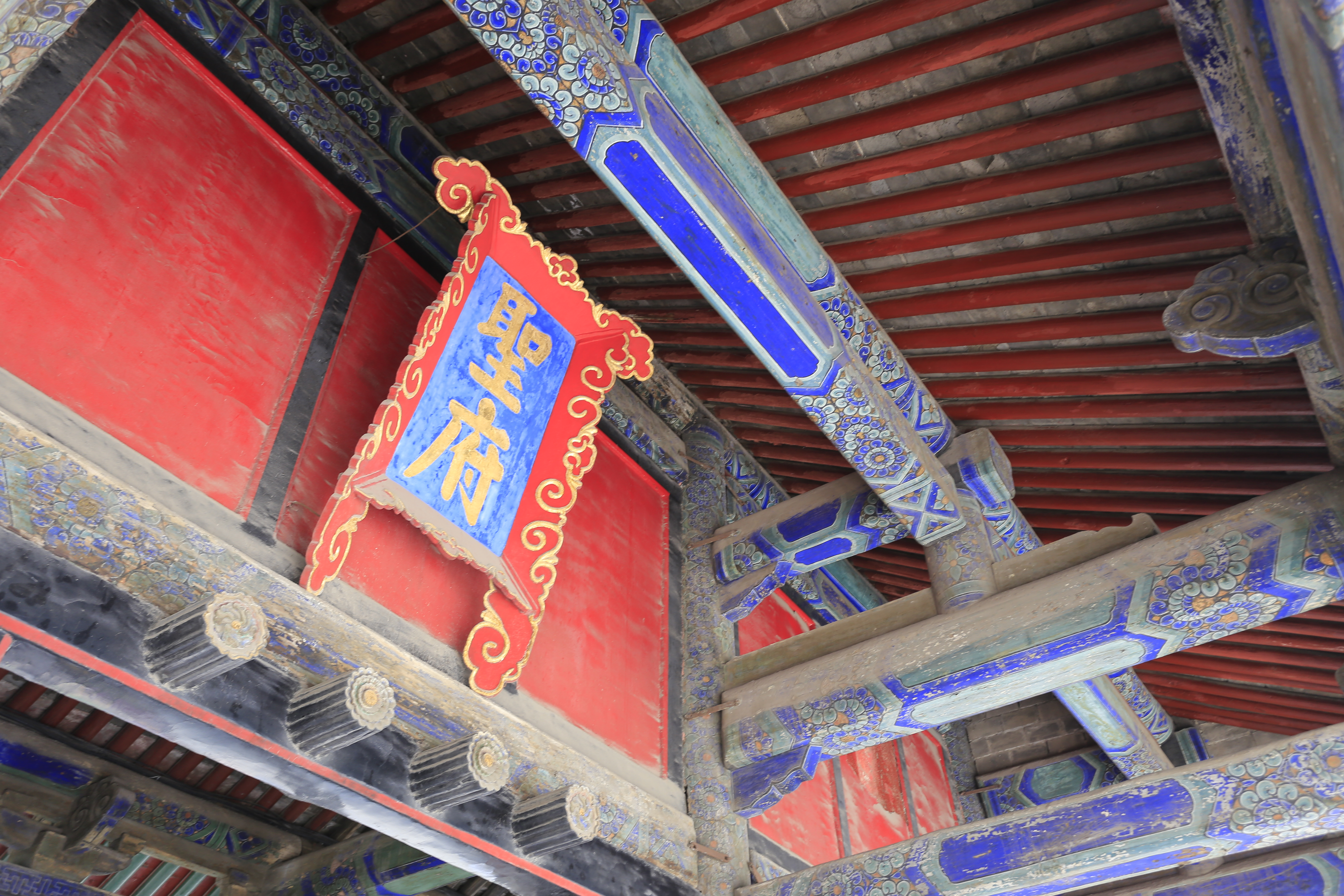 曲阜孔府—— 大门“圣府”匾